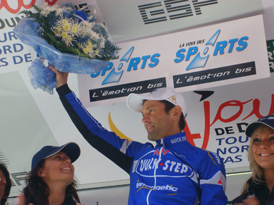 Cédric Vasseur sur le podium des 4 jours de dunkerque 2007, élu le plus combatif sur la dernière étape.